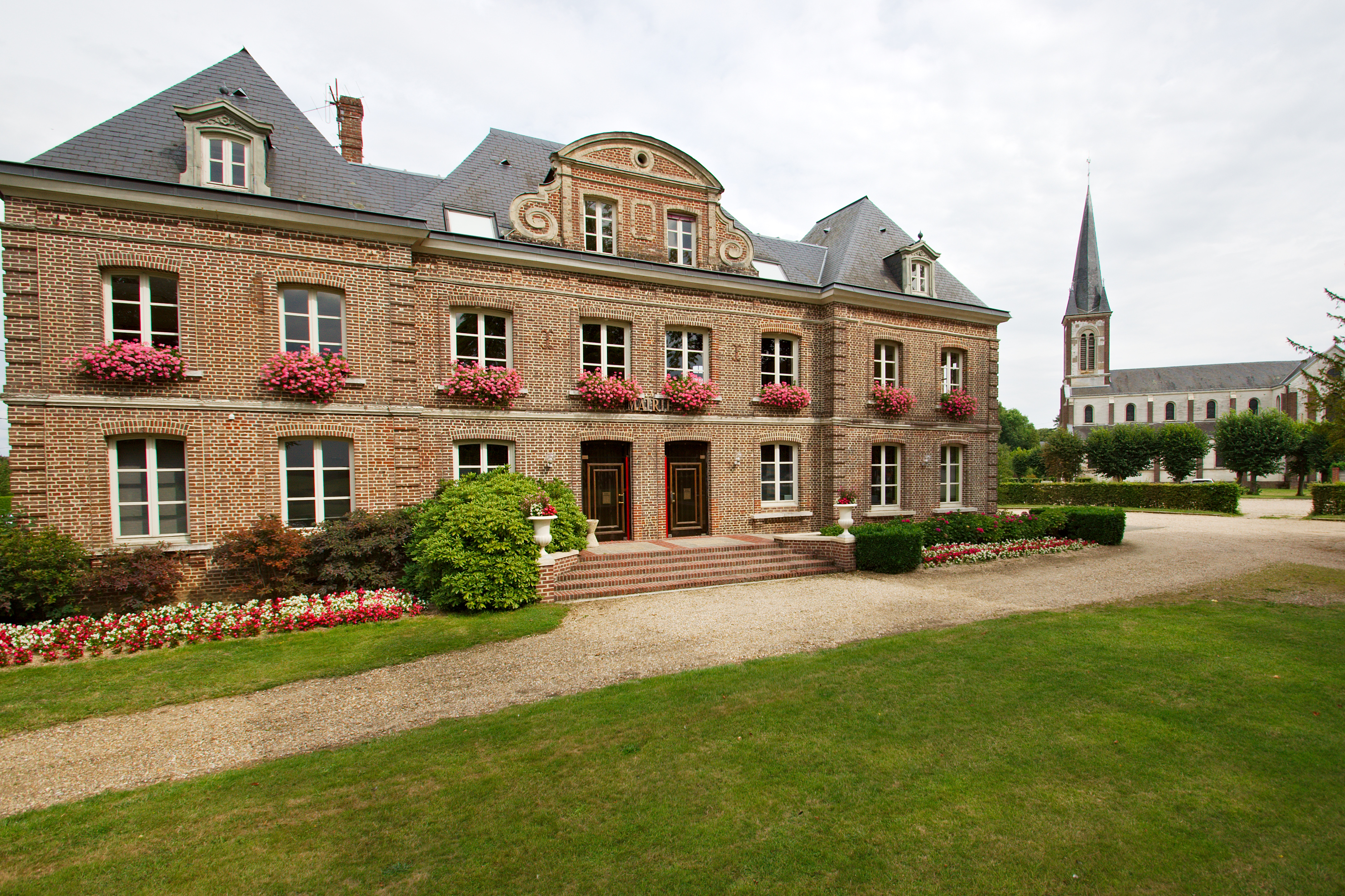 Mairie de Saint-Jacques-sur-Darnétal